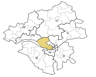 Carte de la troisième circonscription de la Loire-Atlantique